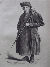 Pater Placidus a Spescha (1752-1833)